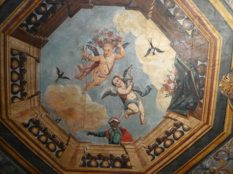 Plafond de l'apothicairerie de l'Hôtel-Dieu de Thoissey - Auteur Jean Noblet, maître charpentier à Villefranche-sur-Saône.